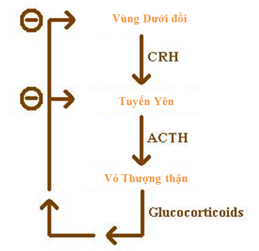 Cân bằng nội môi, điều hòa ngược âm tính ở vùng dưới đồi do tuyến thượng thận